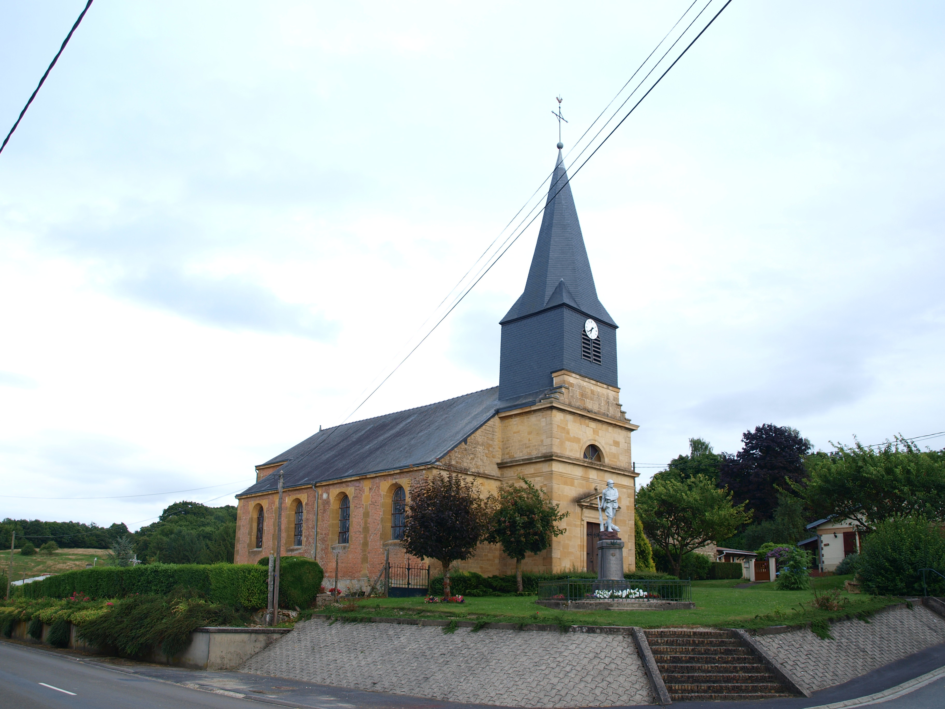 Montcheutin (Ardennes, France) ; église